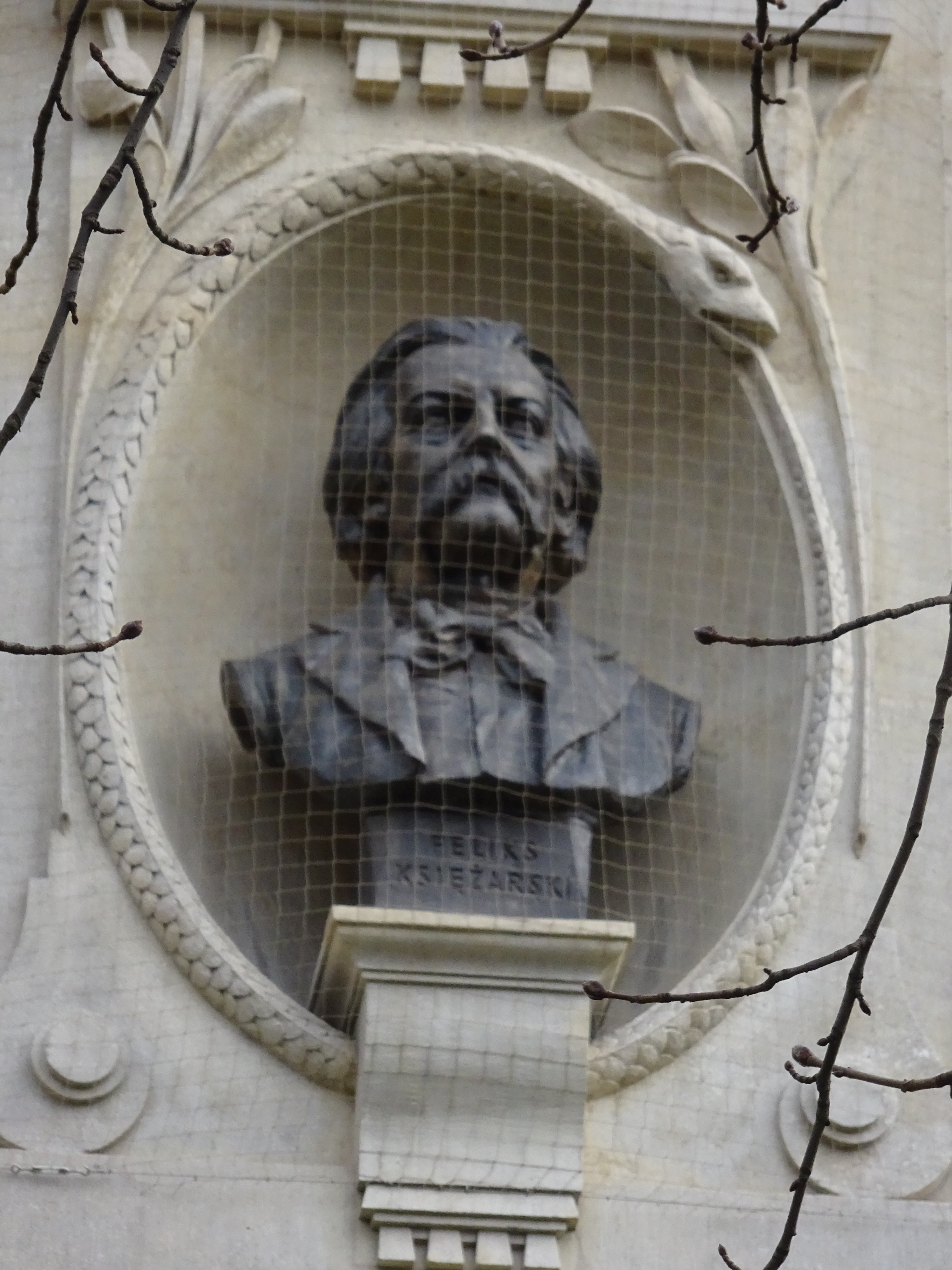 Popiersie Feliksa Księżarskiego na zachodniej elewacji Pałacu Sztuki w Krakowie. 2016